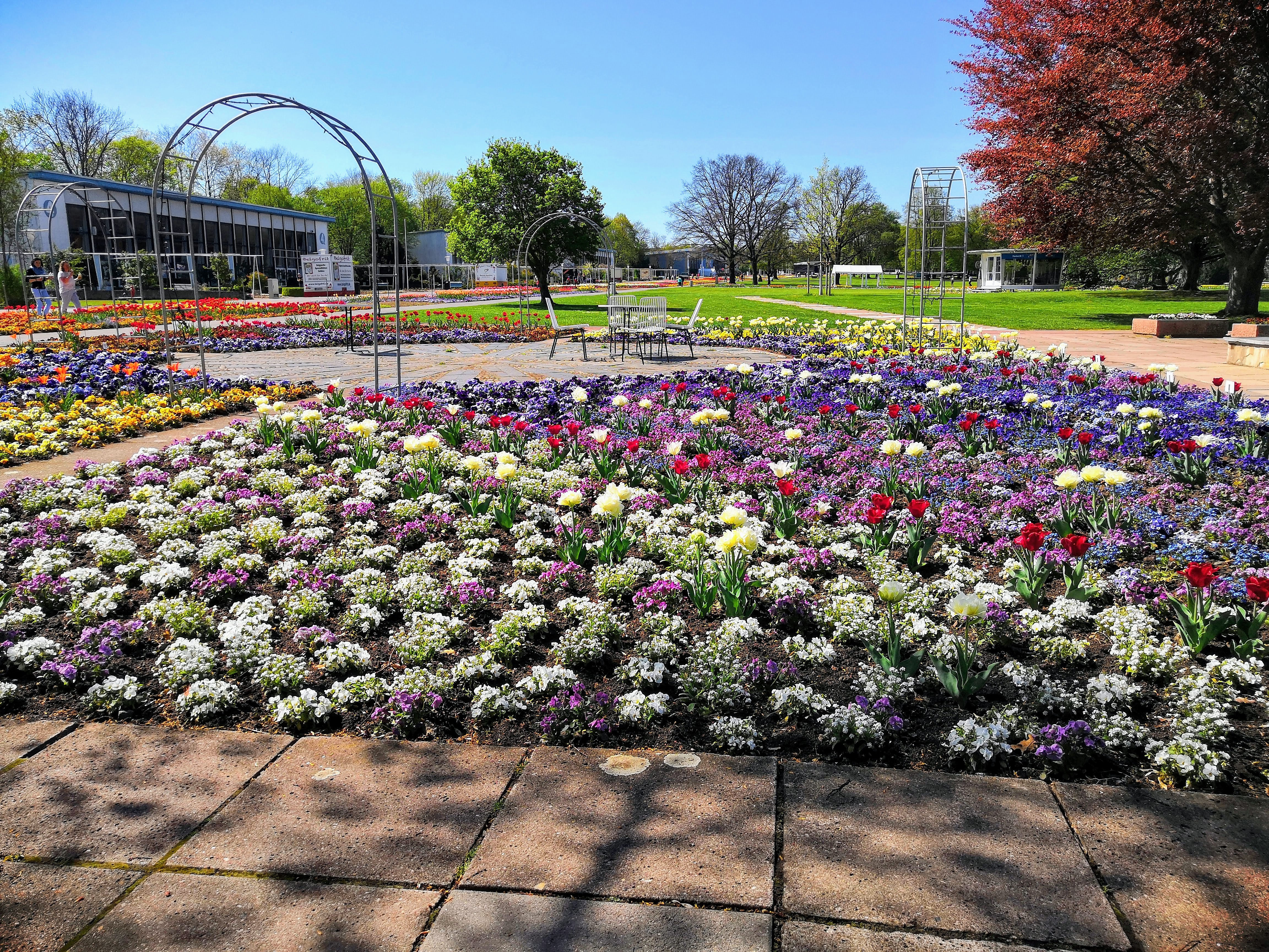 egarpark Zentrales Blumenbeet im April 2019